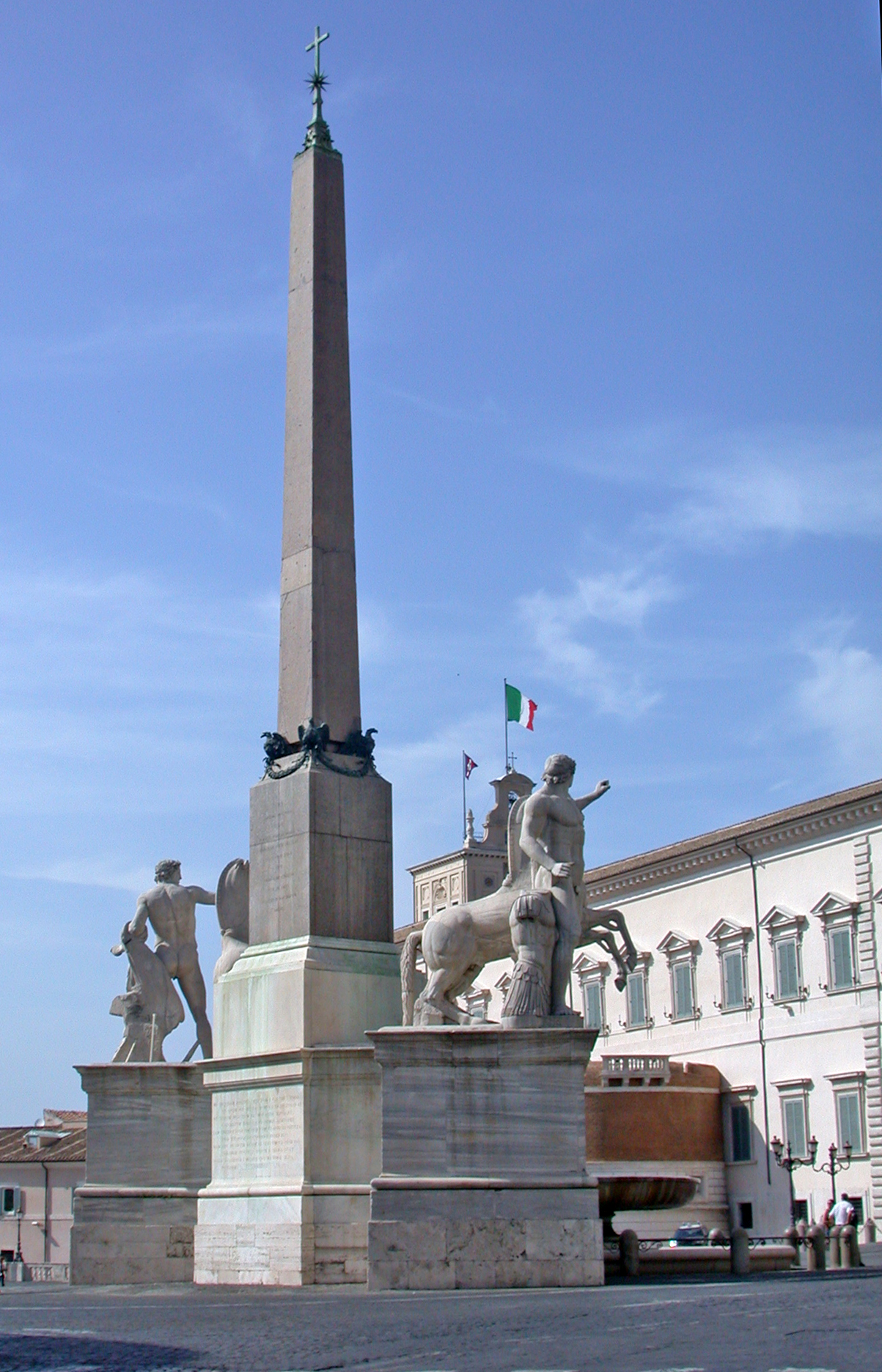 Roma, Obelisco a piazza del Quirinale (antico Monte Cavallo). Foto personale (maggio 2005) by MM in it.wiki